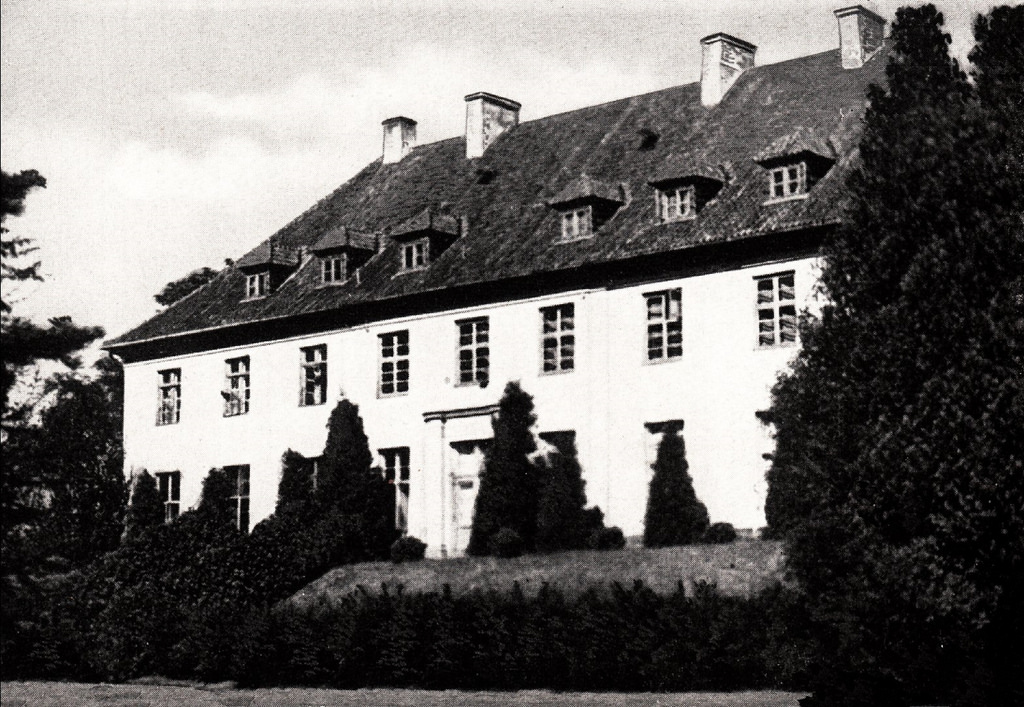 Herrenhaus Fuchshöfen in Ostpreußen, zerstört 1945